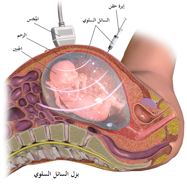 رسم توضيحي لبزل السائل السلوي